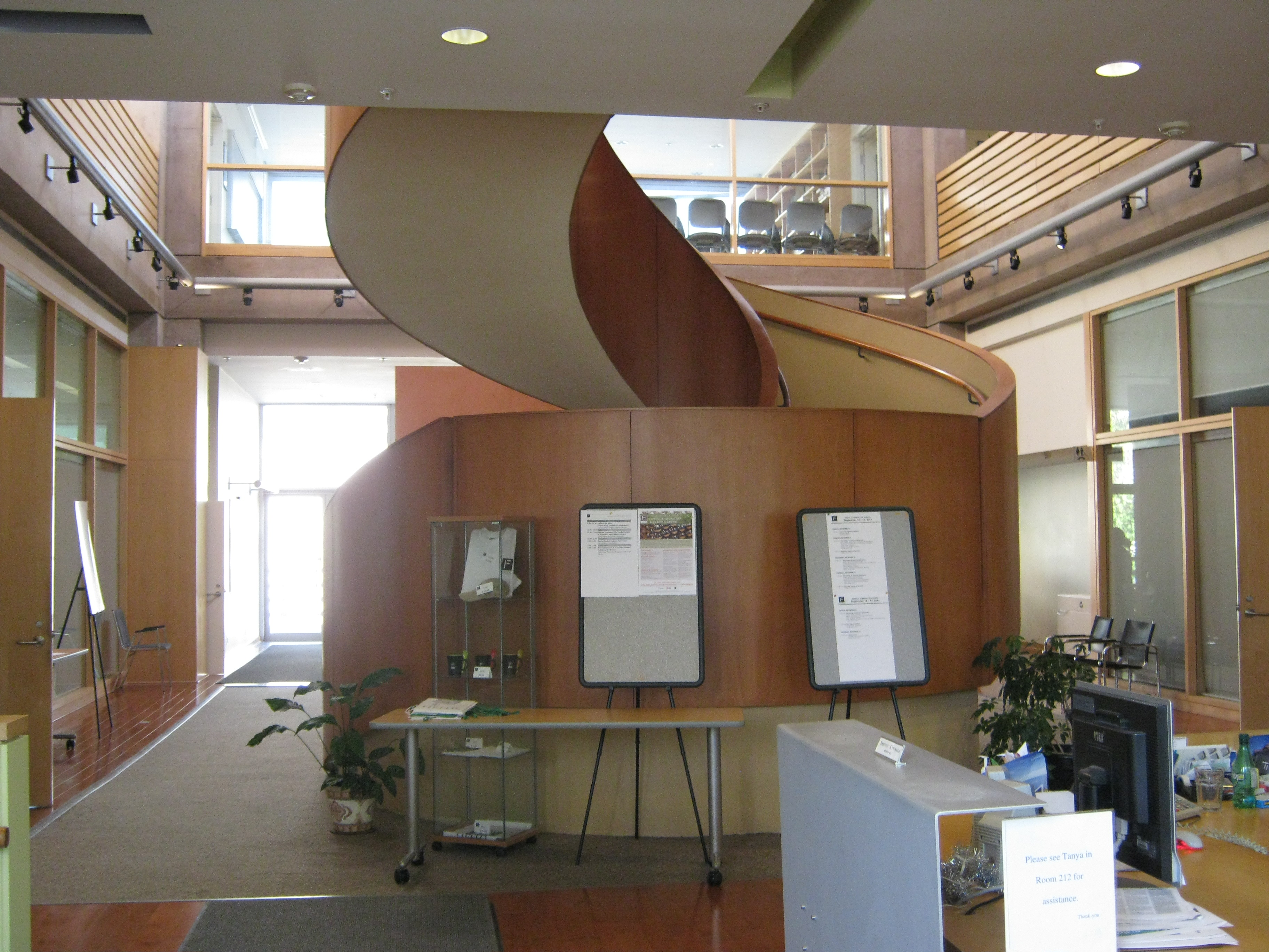 Recibidor del Instituto Fields